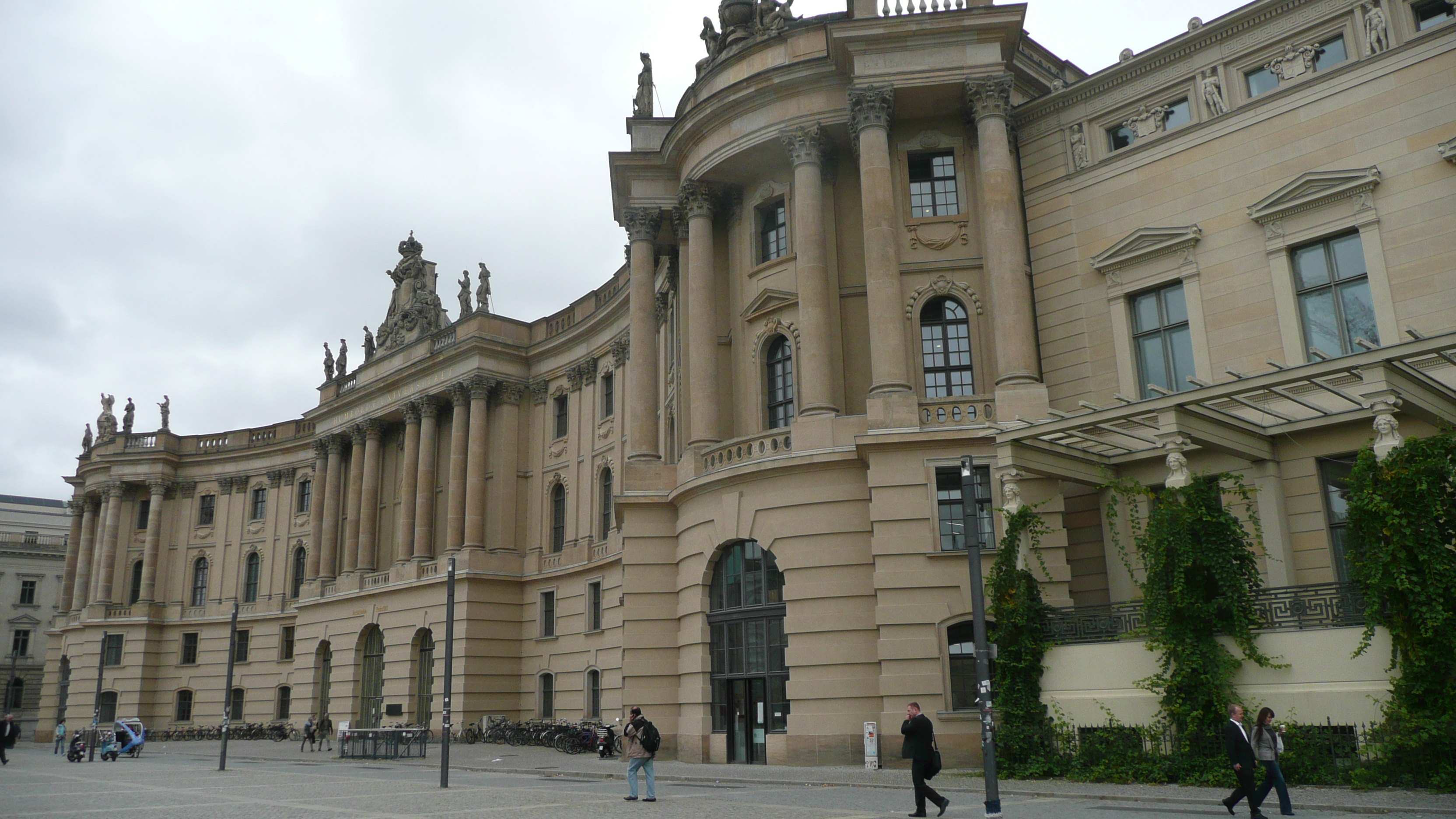 Humboldt-Universität zu Berlin